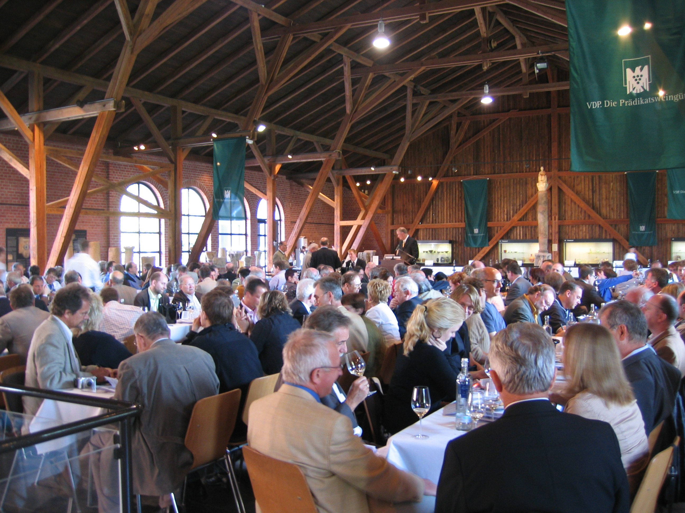 2007 VDP Nahe-Ahr wine auction at Römerhalle, Bad Kreuznach, Germany with Hans-Jürgen Podzun as auctioneer